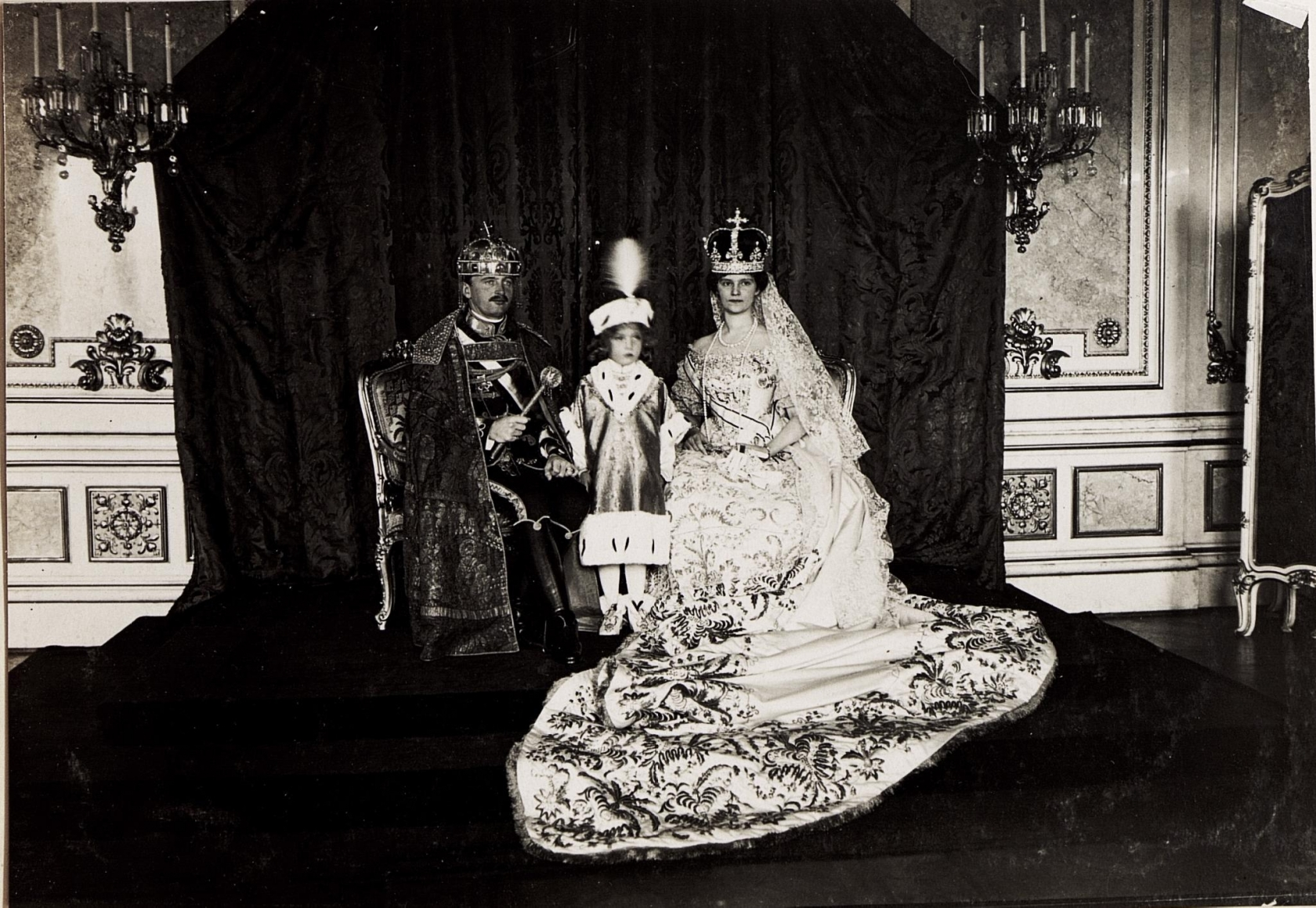 Krönung Kaiser Karls in Budapest